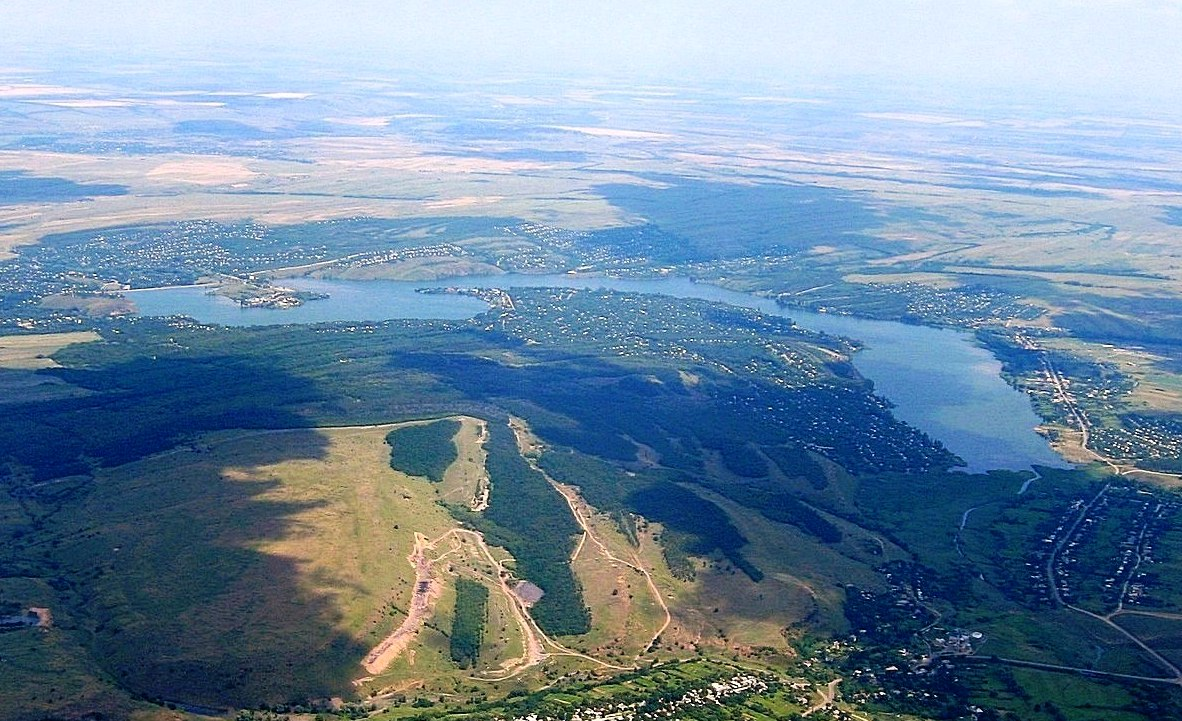 Исаковское водохранилище, Перевальский район, Луганская область, Украина